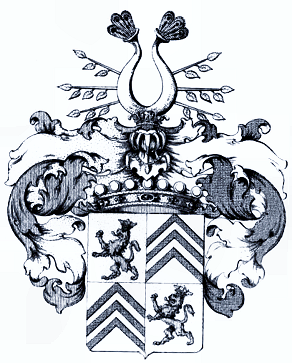 Wappen der Freiherren von Haynau